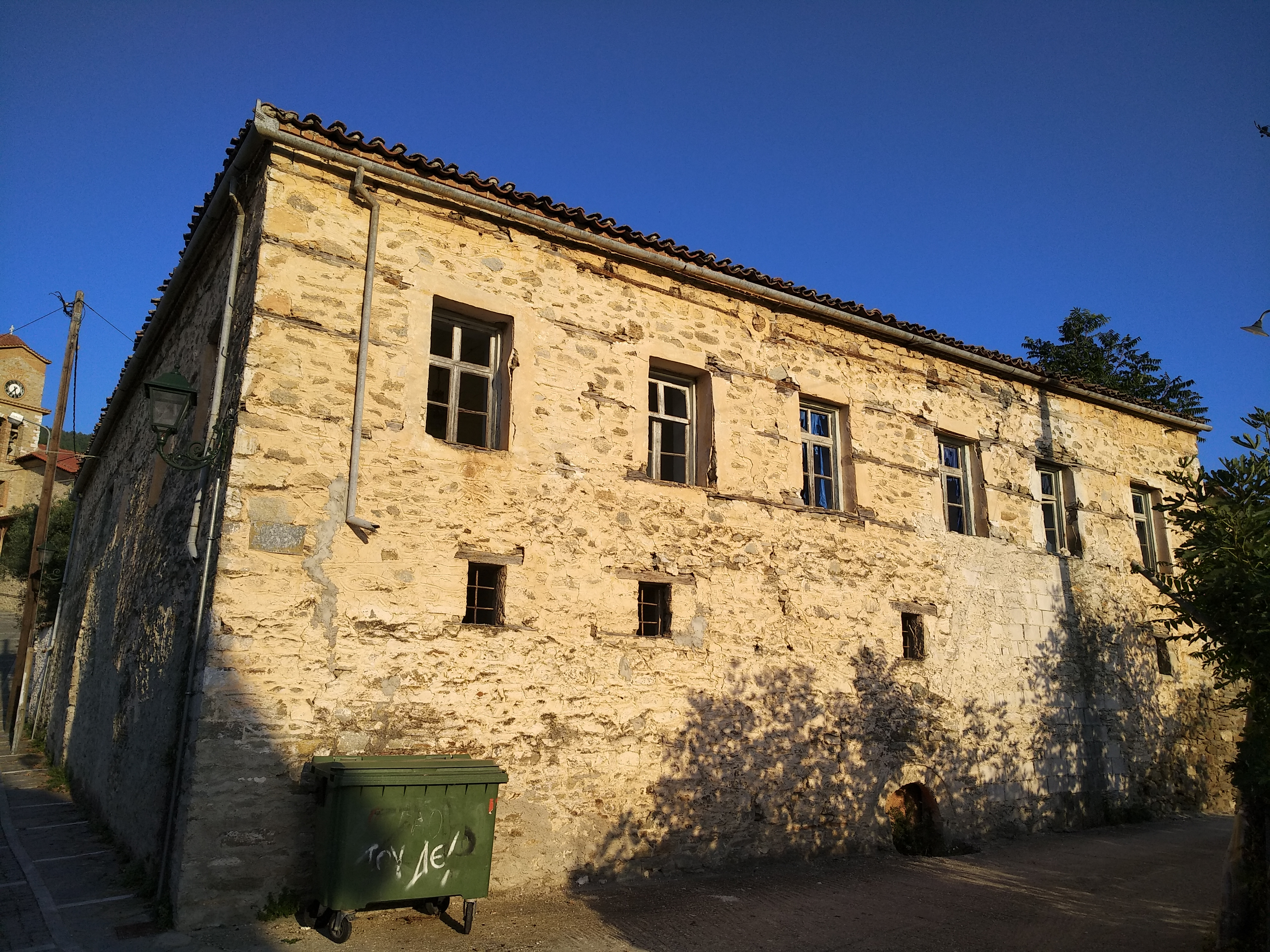 Τσαριτσάνη - αρχοντικό Αδαμουλα - 1